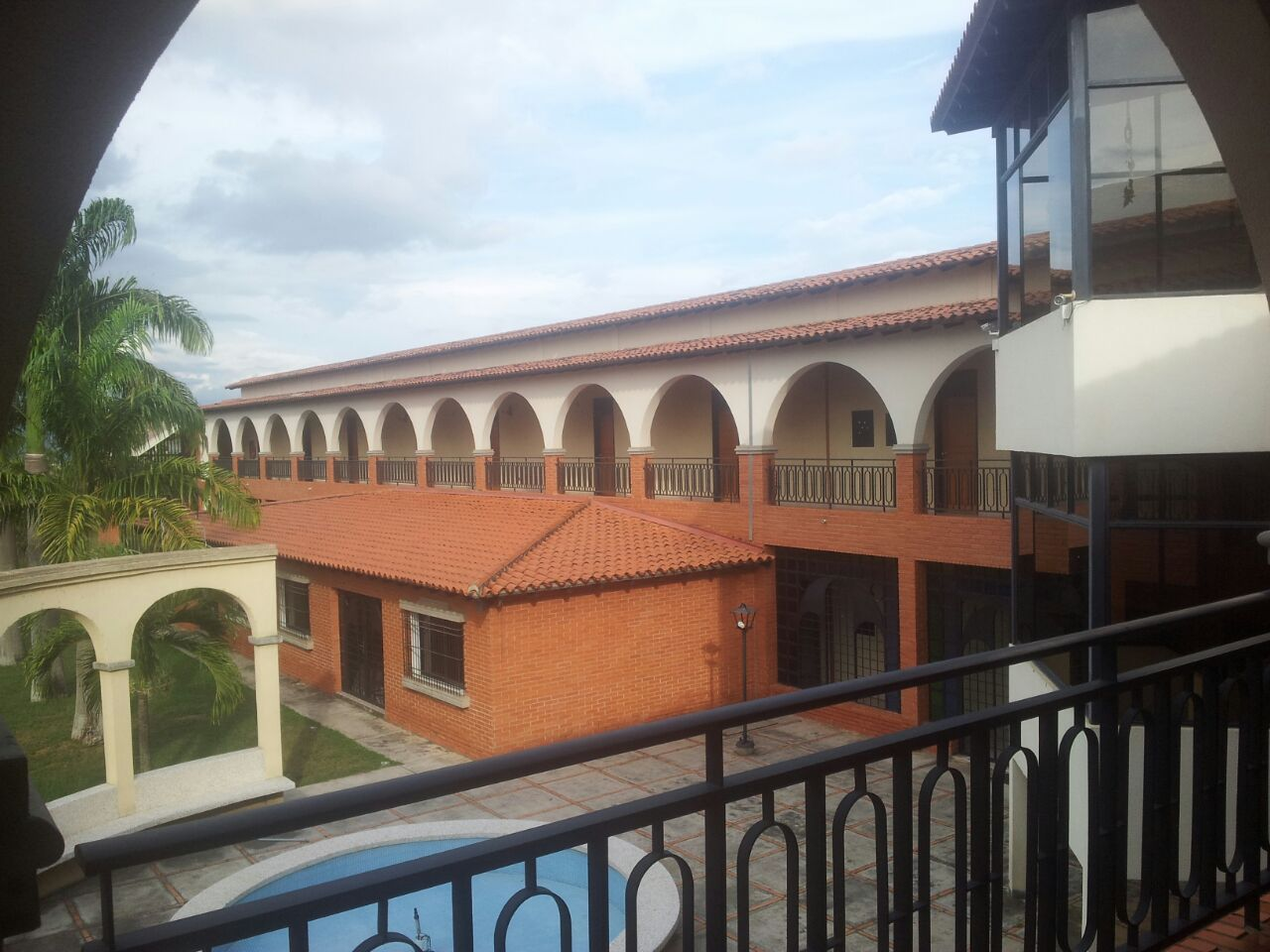 Interior del seminario "los agustinos" (Lara)